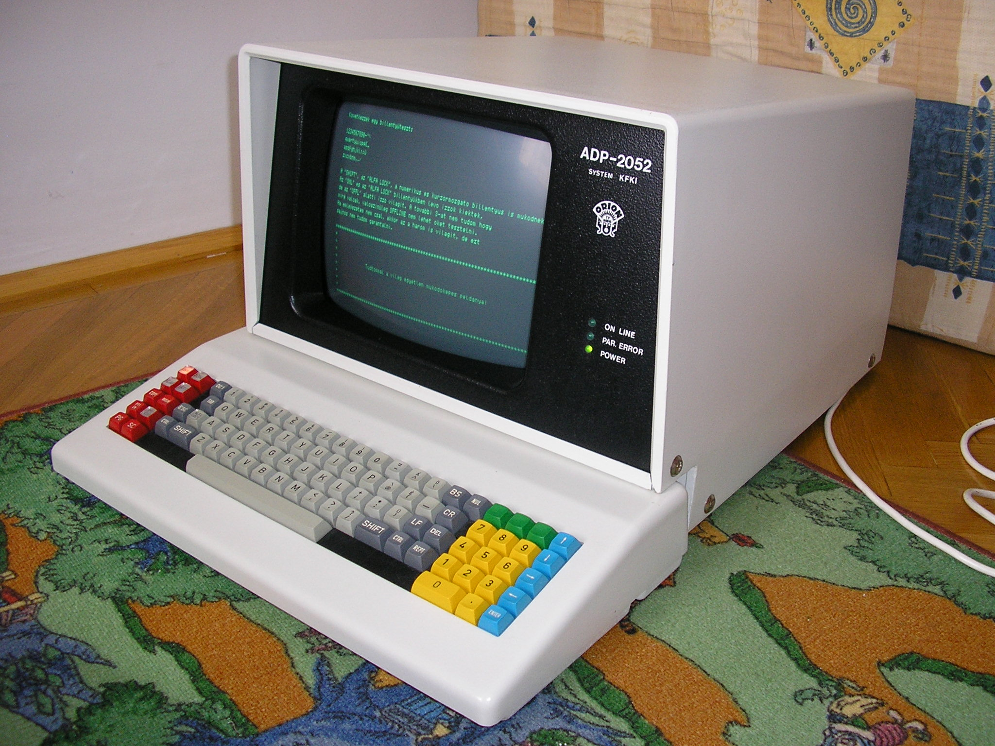 Orion / KFKI (Központi Fizikai Kutatóintézet) ADP-2052 terminal (DEC VT52 compatible).